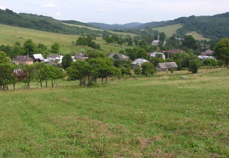 Celkový pohľad